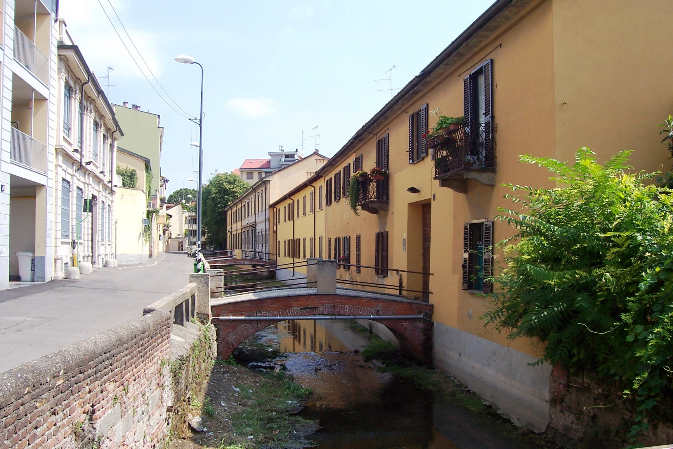 La roggia Boniforte, l'ultima che esce dal naviglio Grande a Milano.